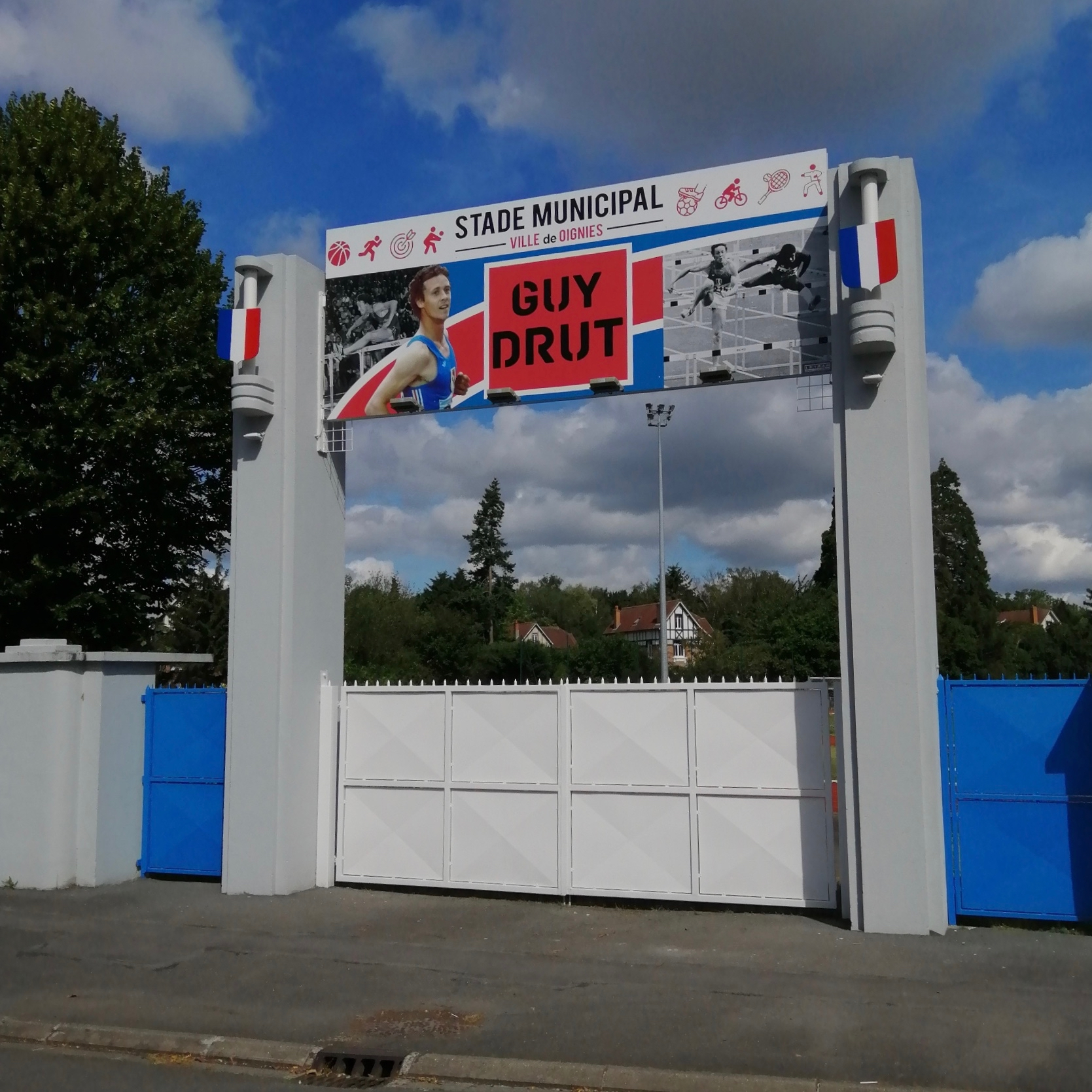 Entrée du stade de la commune française Oignies au nom de Guy Drut.